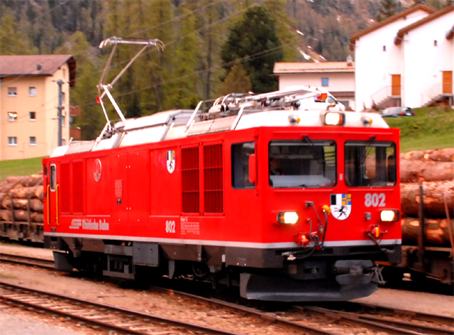 Lokomotive Gem 4/4 der Rhätischen Bahn (RhB) am 2. Juni 2010 in Pontresina